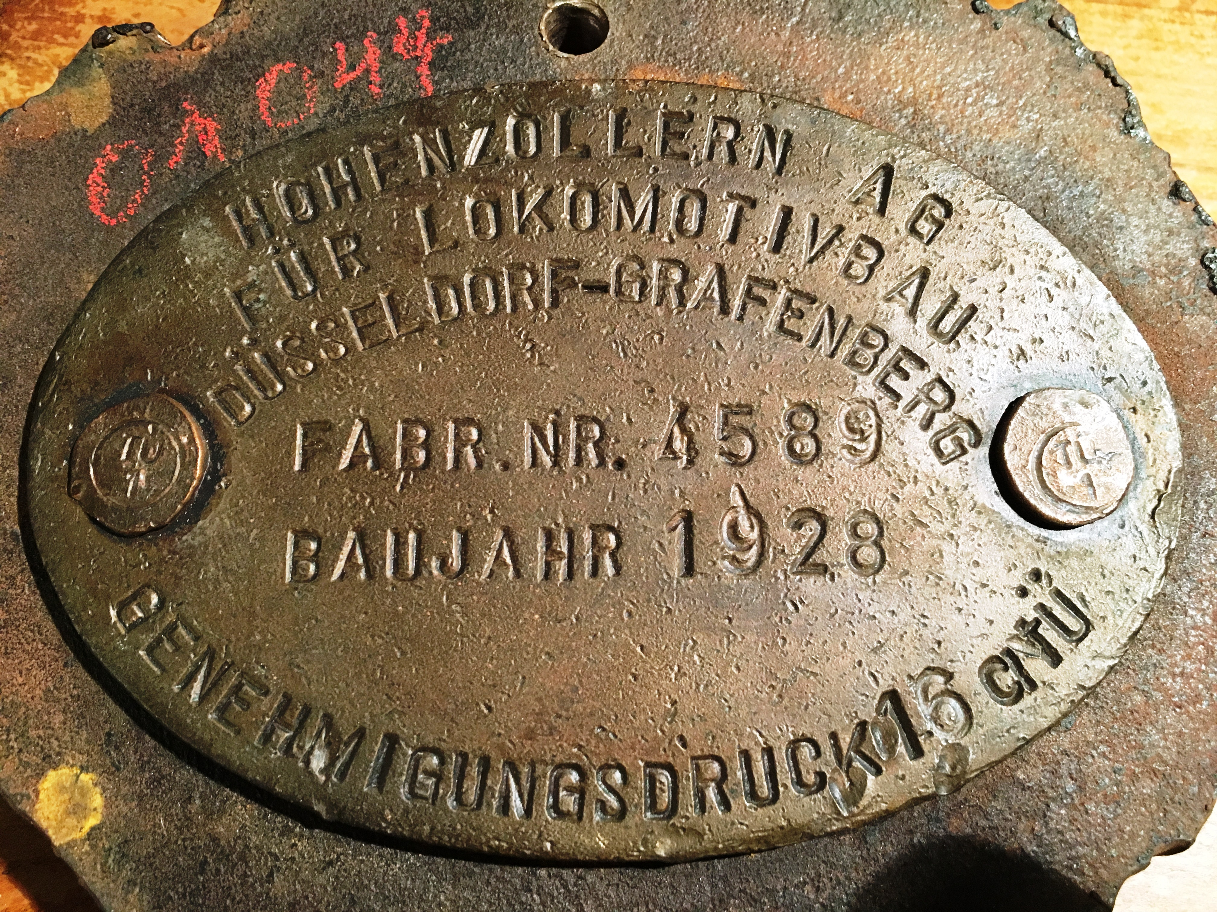 Kesselschild mit Resten des Stehkessels der Schnellzug-Dampflokomotive 01 044 aus dem Baujahr 1928